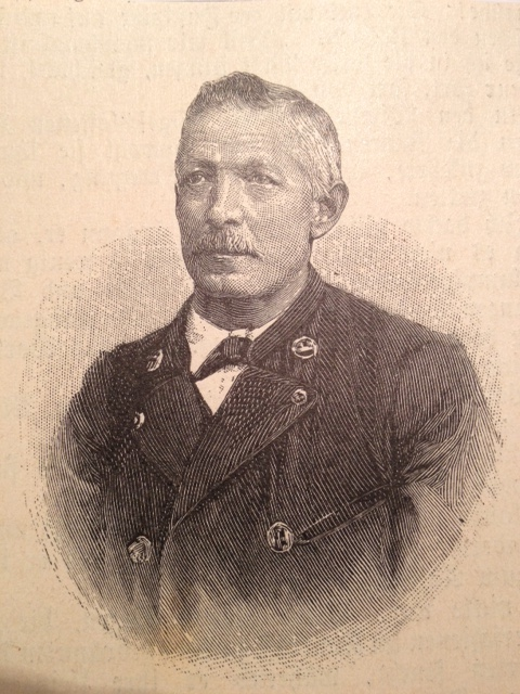 Houtgravure voorstellend een portret van de Zwitserse kartograaf Rudolf Leuzinger, gepubliceerd in de Illustrirte Welt bij zijn necrologie (1896)